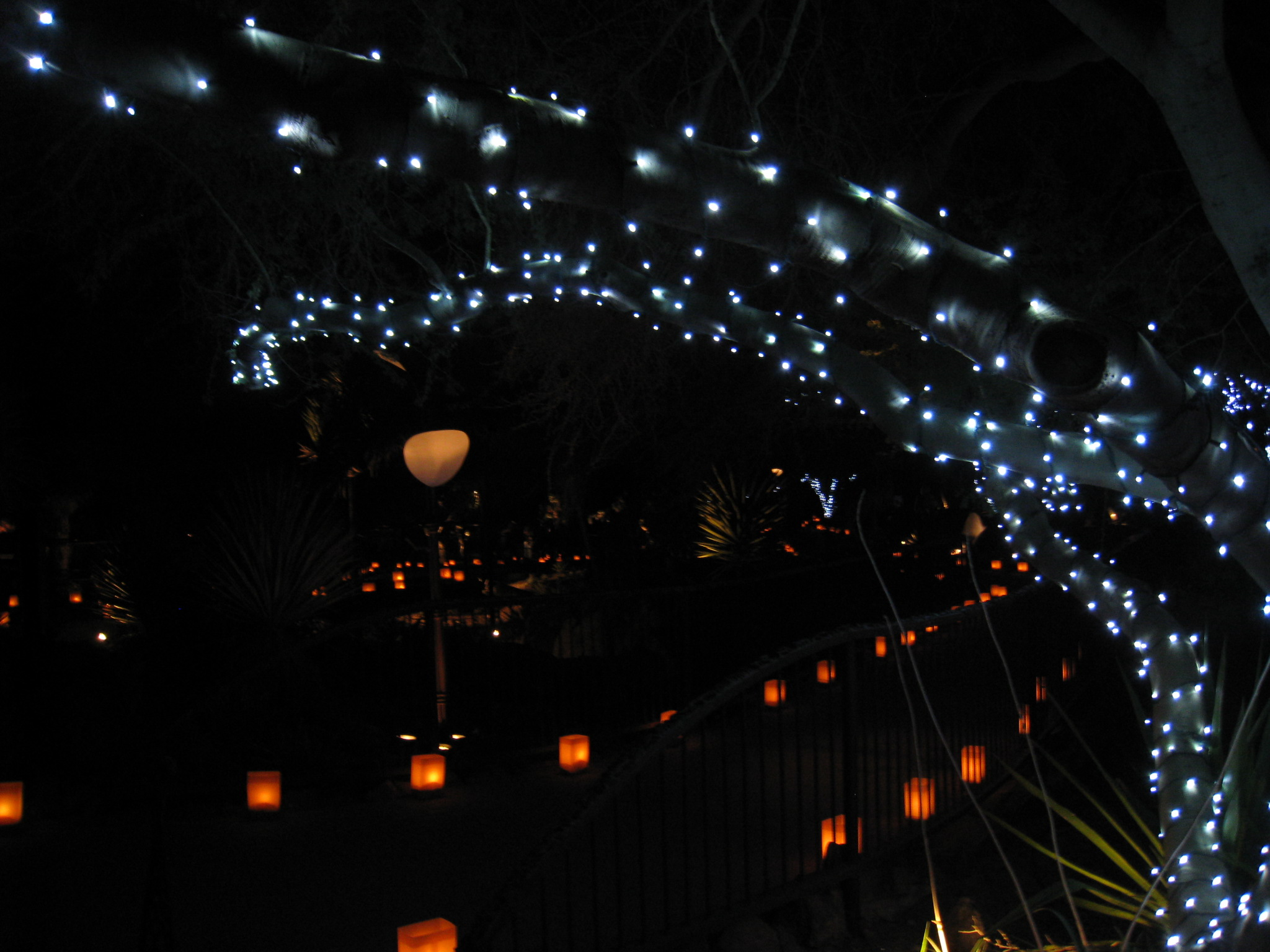 Las Noches de las Luminarias